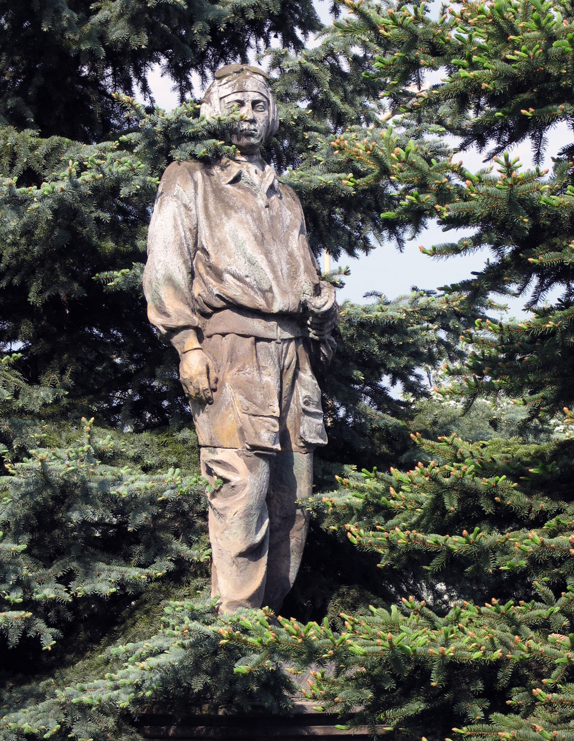 Pieskovcová skulptúra pilota